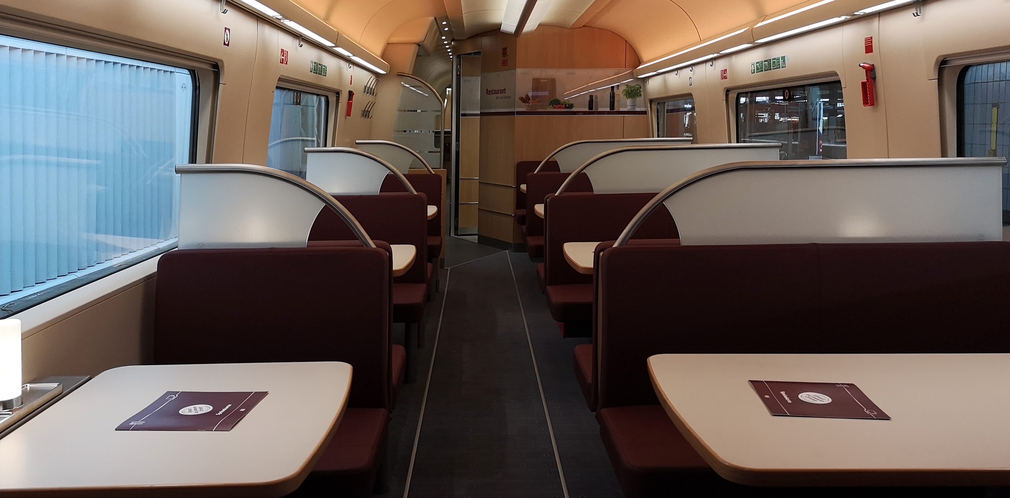 ICE 4 Restaurant